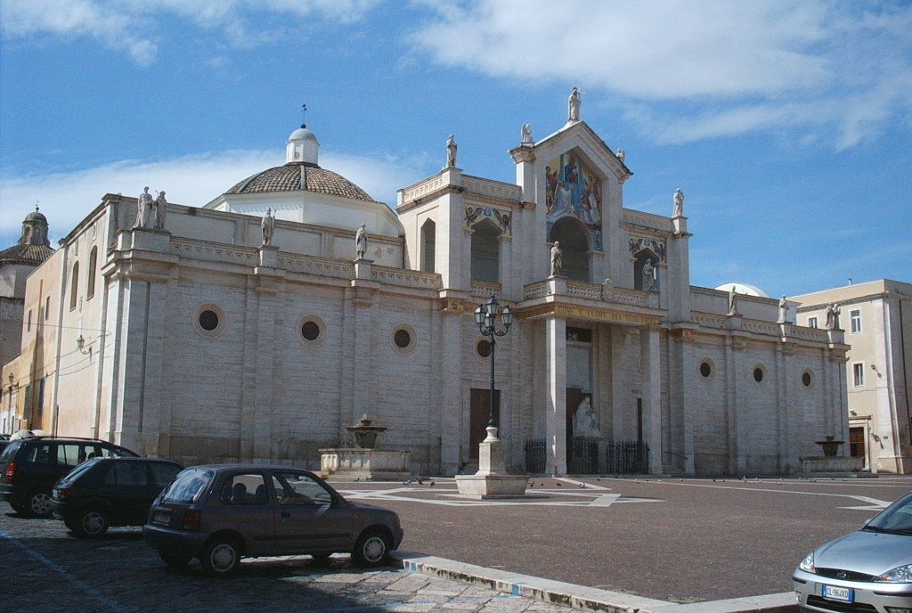 La Bellissima facciata della Cattedrale di Manfredonia, rifatta negli anni '60 per volontà del vescovo Andrea Cesarano. Opera dello Scultore Aronne Del Vecchio. Foto di Marcello Castigliego